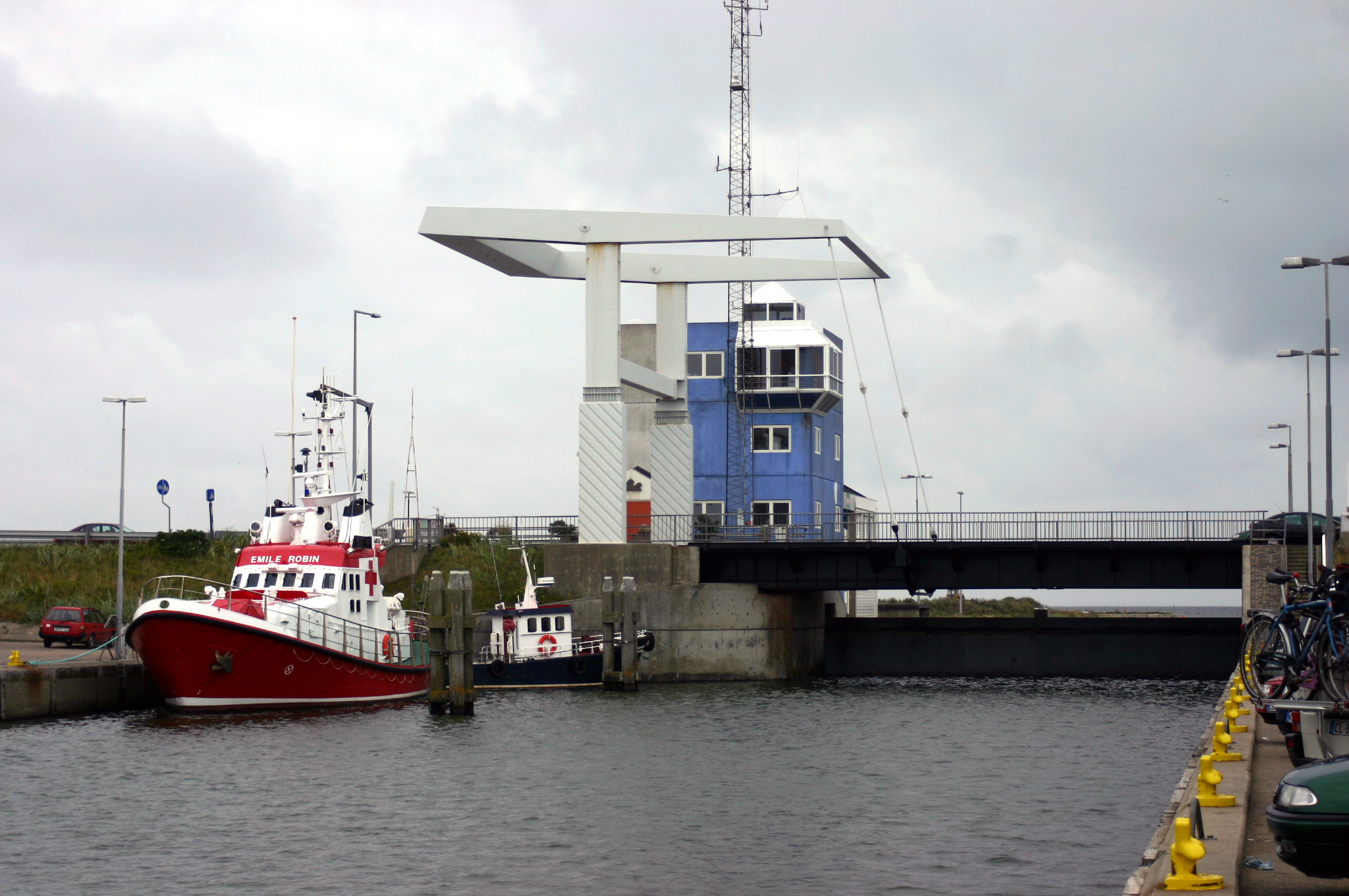 Hvide Sande, Denmark, Lock and Bridge